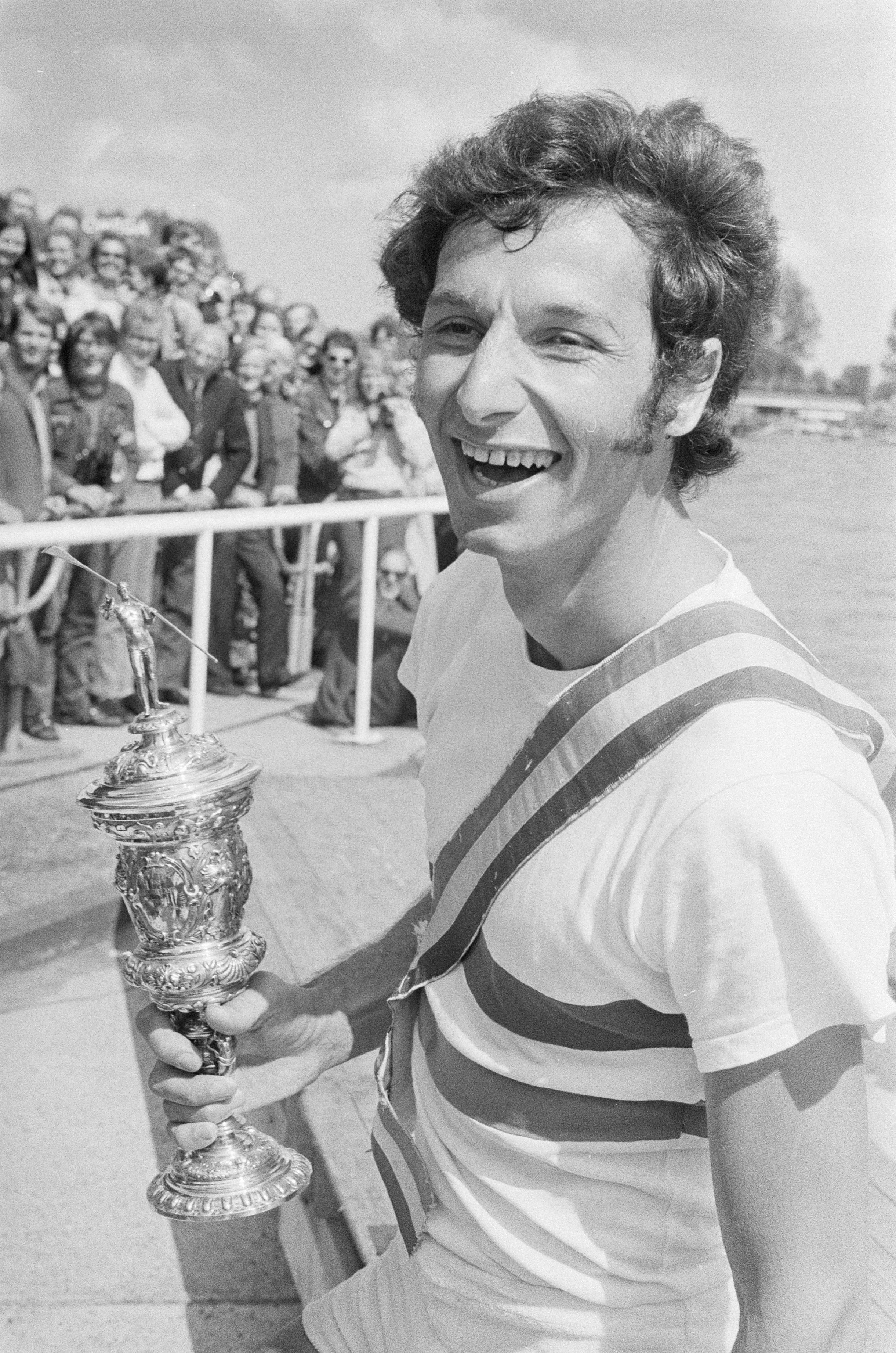 Roeiwedstrijden op Bosbaan, Bachmann (Zwitserland) met Holland beker